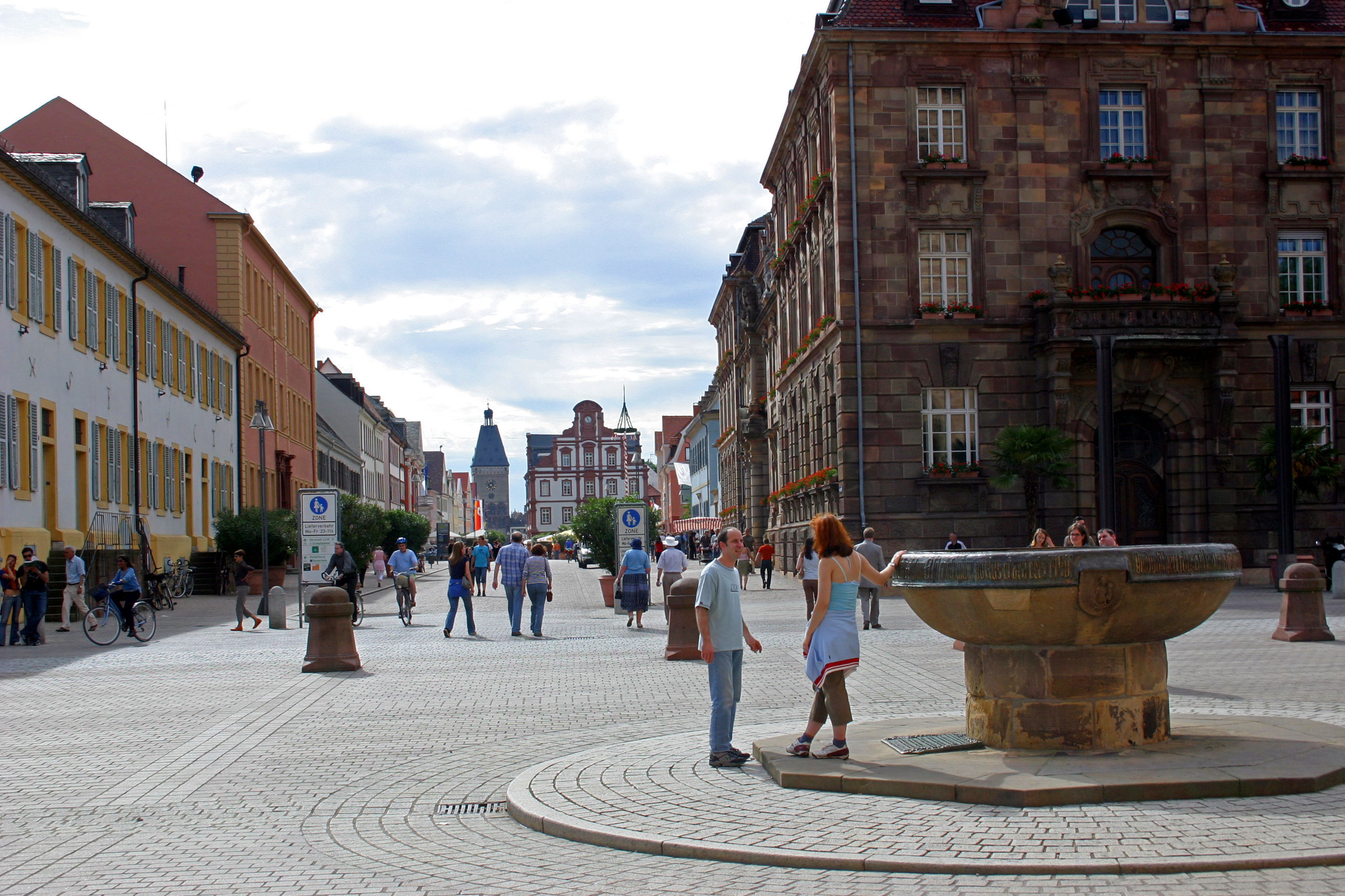 Speyer